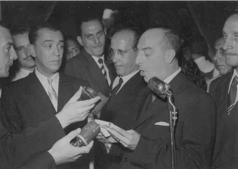 Discurso de Milton Campos ao passar o cargo de Governador de Minas Gerais para JK, em 1951.